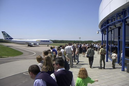 Szczecin